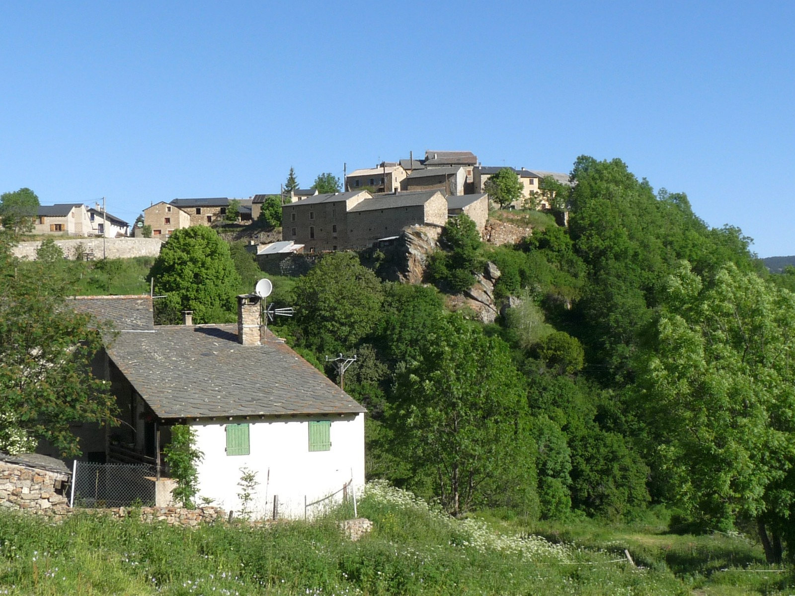 Hameau du Castell, Planès, Pyrénées-Orientales, France